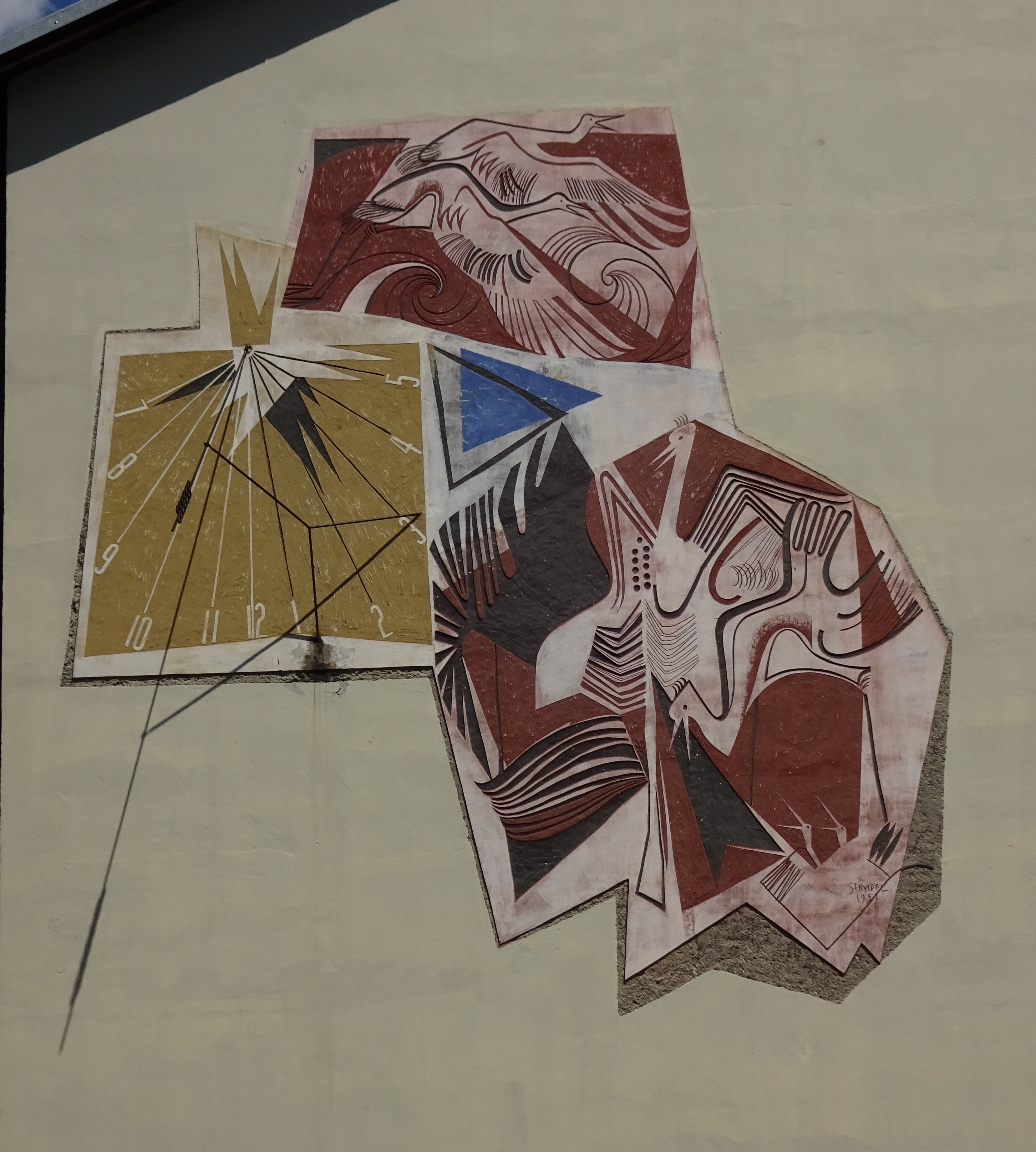 Sgraffito mit Sonnenuhr an der südlichen Giebelfassade des Hauses Mitterhoferstraße 11, Innsbruck-Pradl, von August Stimpfl, 1957 This media shows the remarkable cultural object in the Austrian state of Tyrol listed by the Tyrolean Art Cadastre with the ID 74150. (on tirisMaps, pdf, more images on Commons)